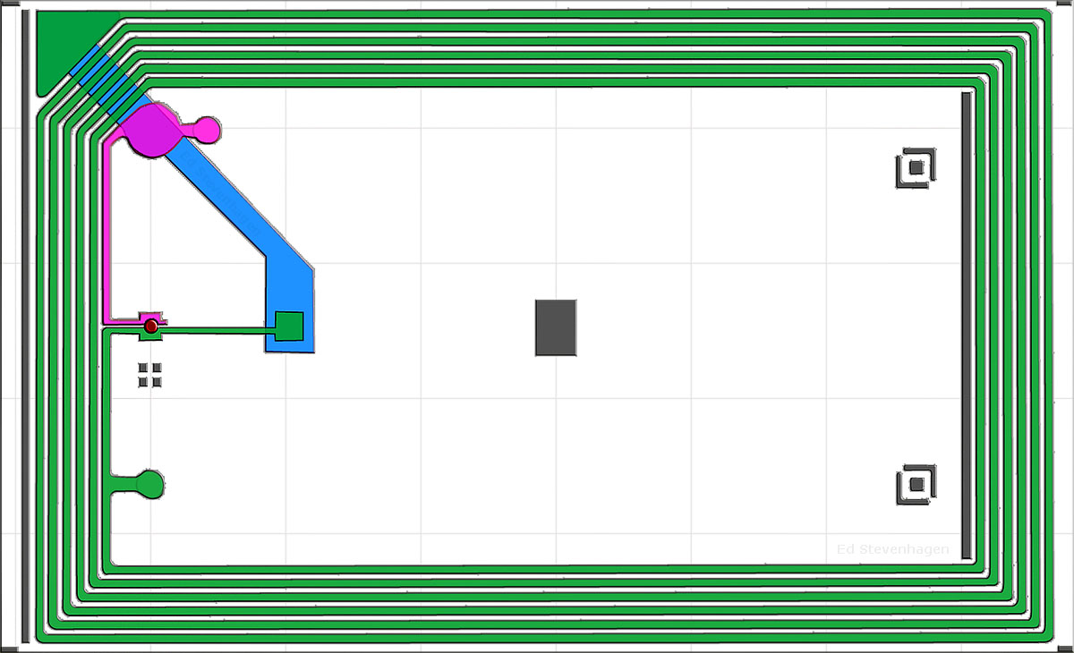 RFID-chip (Radio Frequency Identification) Openbaar vervoer 2012. Grootte 79 x 48 mm. Grid: 10 mm.